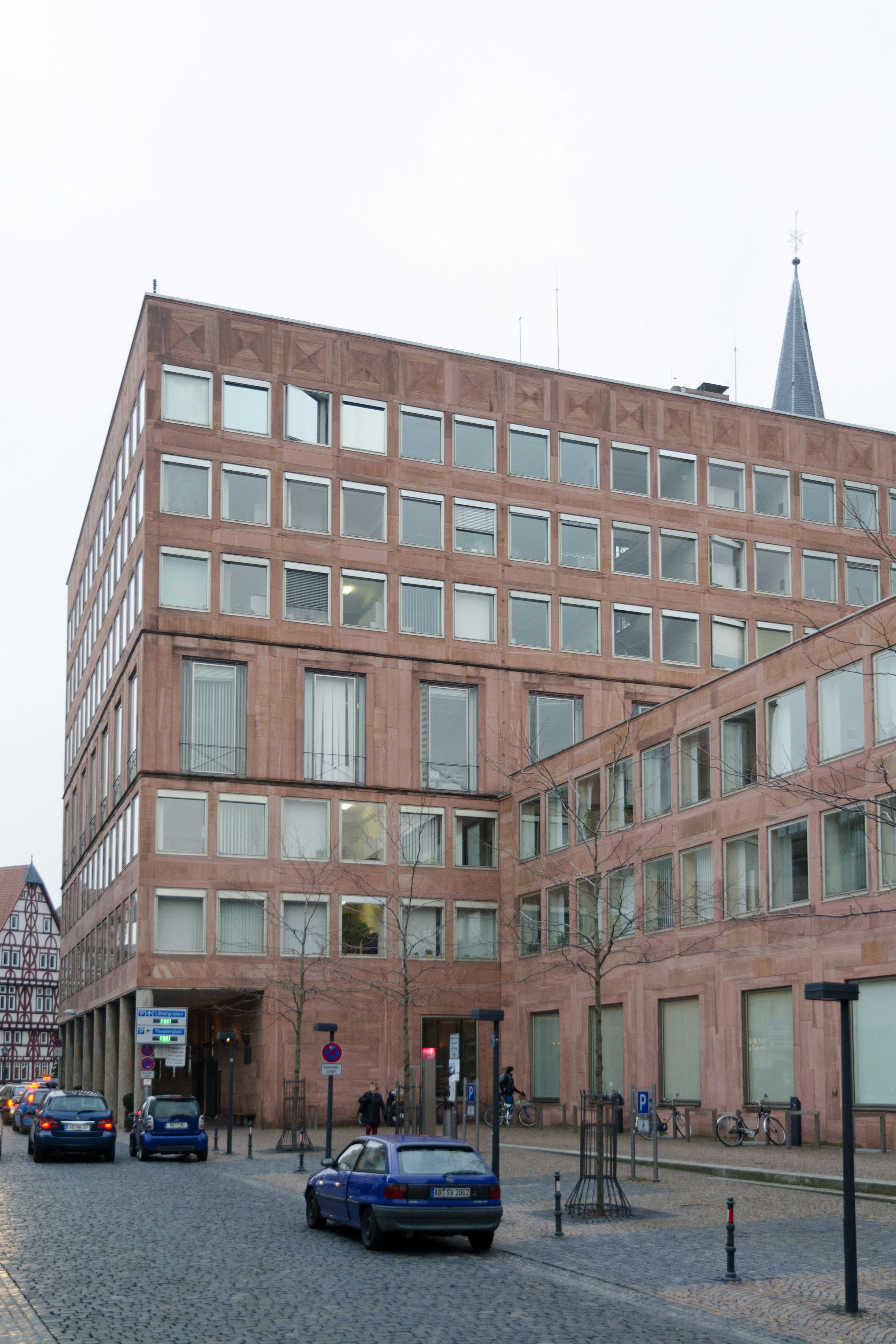 Aschaffenburg, Rathaus, Frontseite